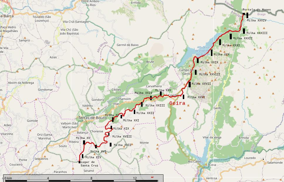 Mapa da Via Nova, Via XVIII do Itinerário de Antonino, ou Geira no concelho de Terras de Bouro e classificada como Monumento Nacional desde 2013